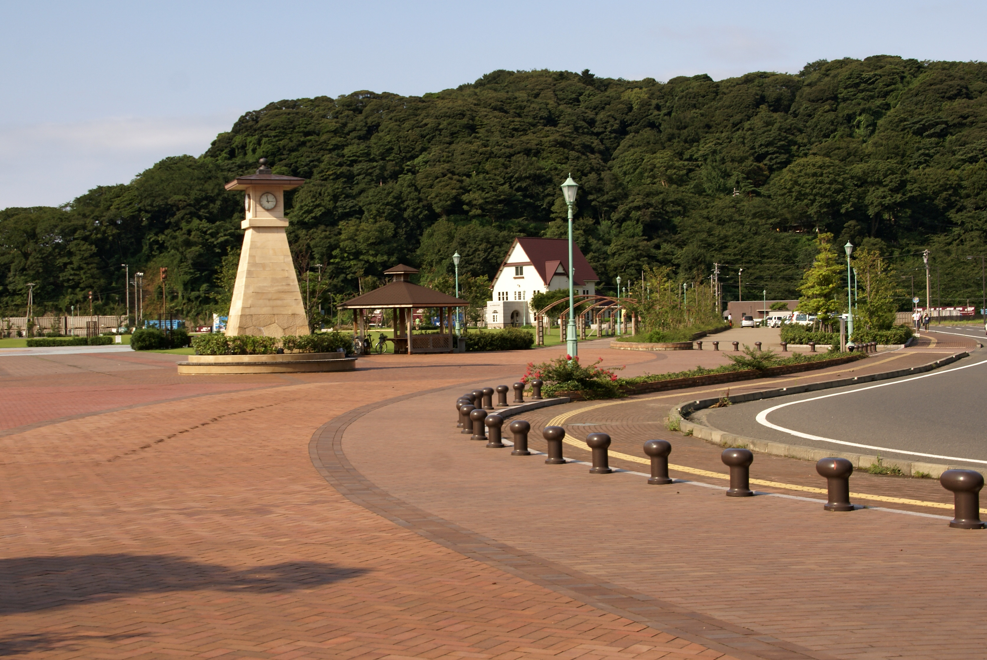 Kanegasaki ryokuchi in Tsuruga, Fukui prefecture, Japan